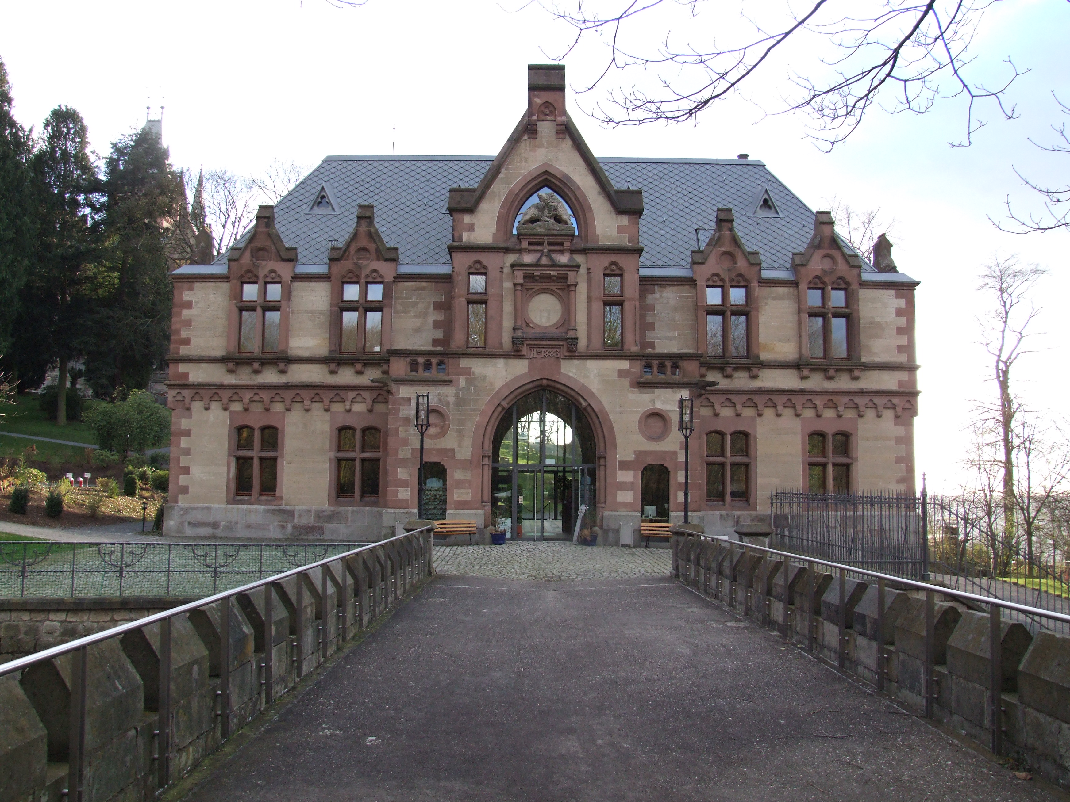 Vorburg Schloss Drachenburg, seit 2002 Deutsches Museum für Naturschutzgeschichte